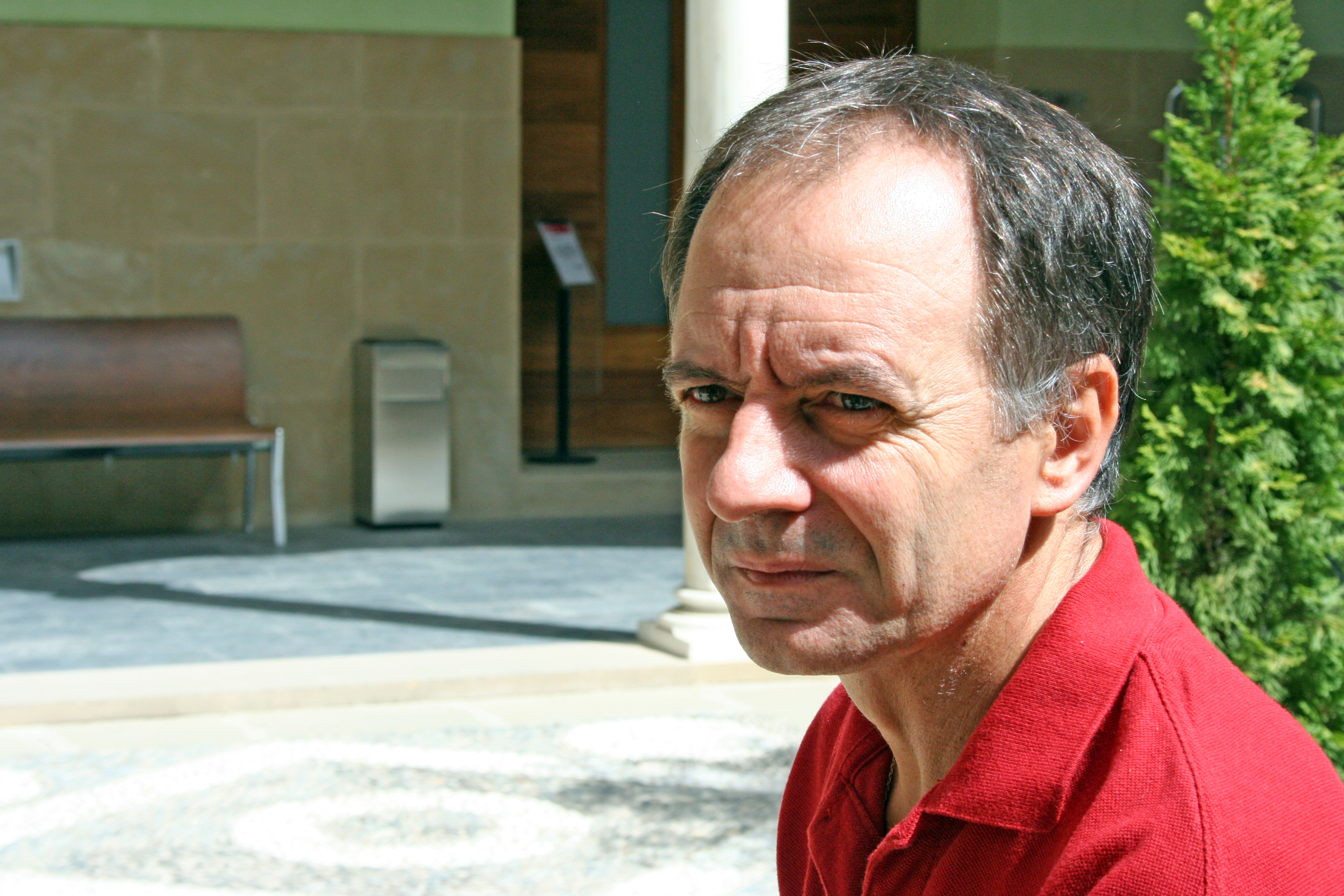 Antonio Soler, Premio Nadal con "El camino de los ingleses", en los Cursos de Verano 2007 de la Universidad Internacional de Andalucía.